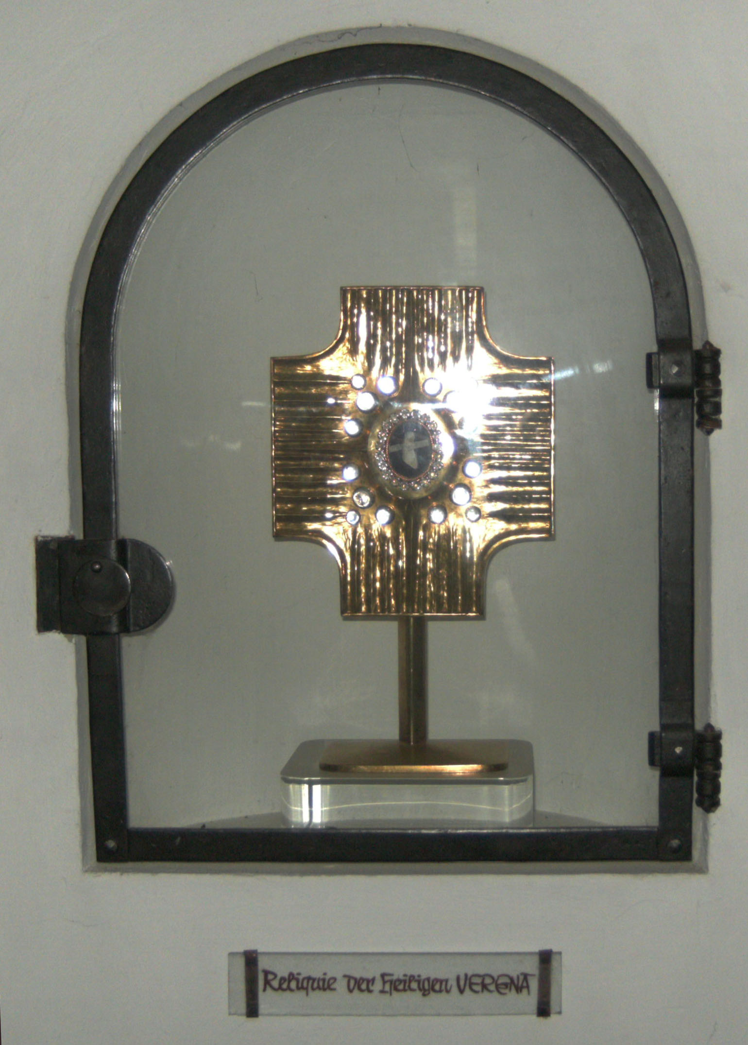 Reliquie der Heiligen Verena. Kleines Stück von einem Knochen gefaßt in einer Monstranz, die am Patrozinium ausgestellt wird. Die Heilige Verena (* um 260 n. Chr.; † um 320 in Zurzach) gehört zu den meistverehrten Heiligen des ehemaligen Bistums Konstanz. Sie soll aus Theben am oberen Nil in Ägypten stammen und liegt in Zurzach (Tenedo) begraben. Sie wird heute noch als Heilerin verehrt. Am 1. September wird ihr Gedenktag gefeiert.